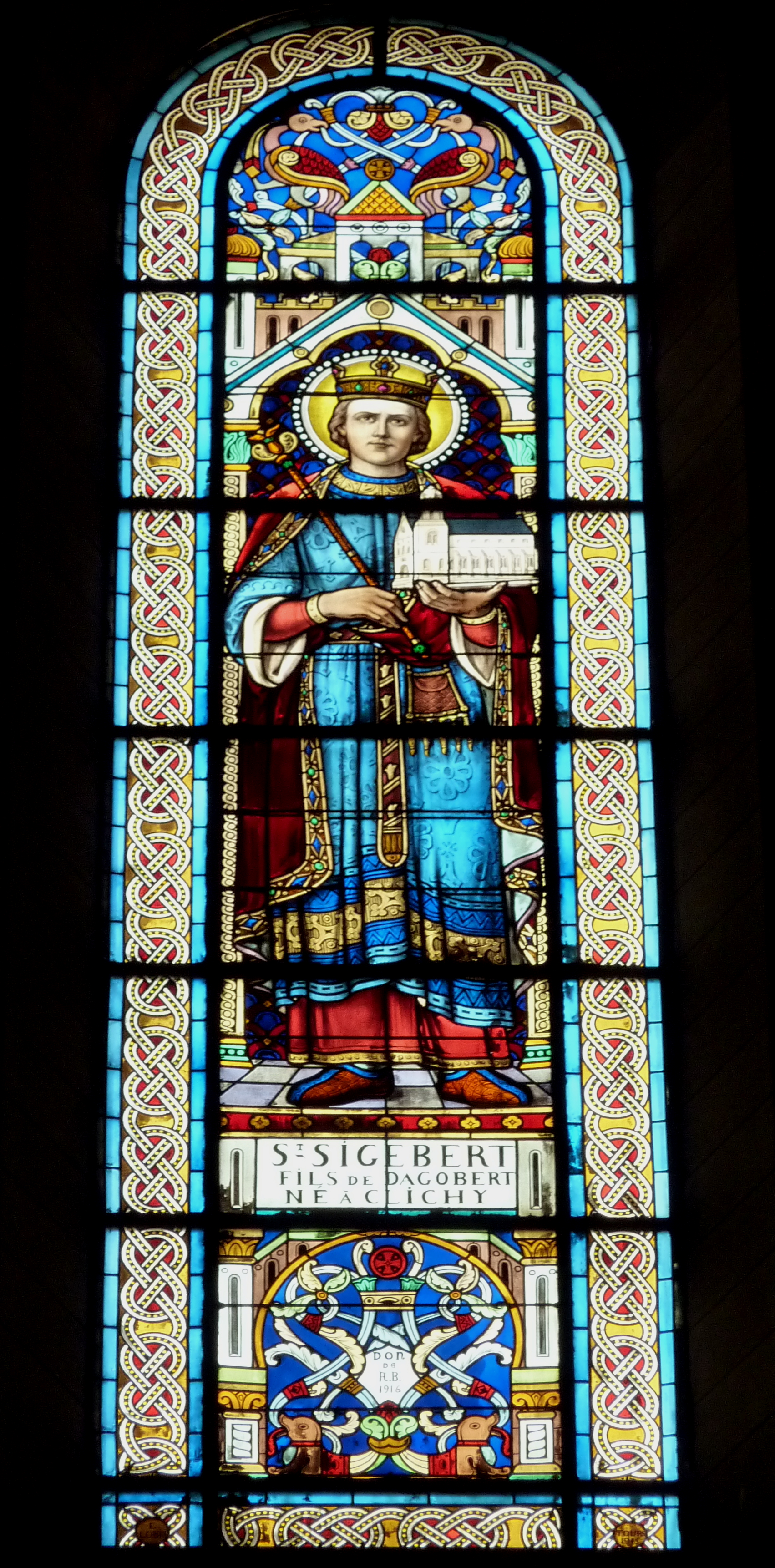 Bleiglasfenster (Ausschnitt) in der katholischen Pfarrkirche Saint-Vincent-de-Paul in Clichy, Darstellung: hl. Sigibert III.